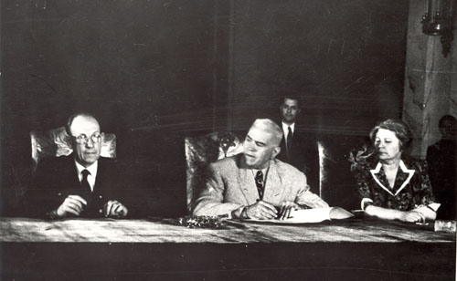 1948 Vizita Unei Delegatii Din Cehoslovacia.De La Stanga - A. Zapotocky - Prim Ministrul Cehoslovac, Petru Groza, Ana Pauker